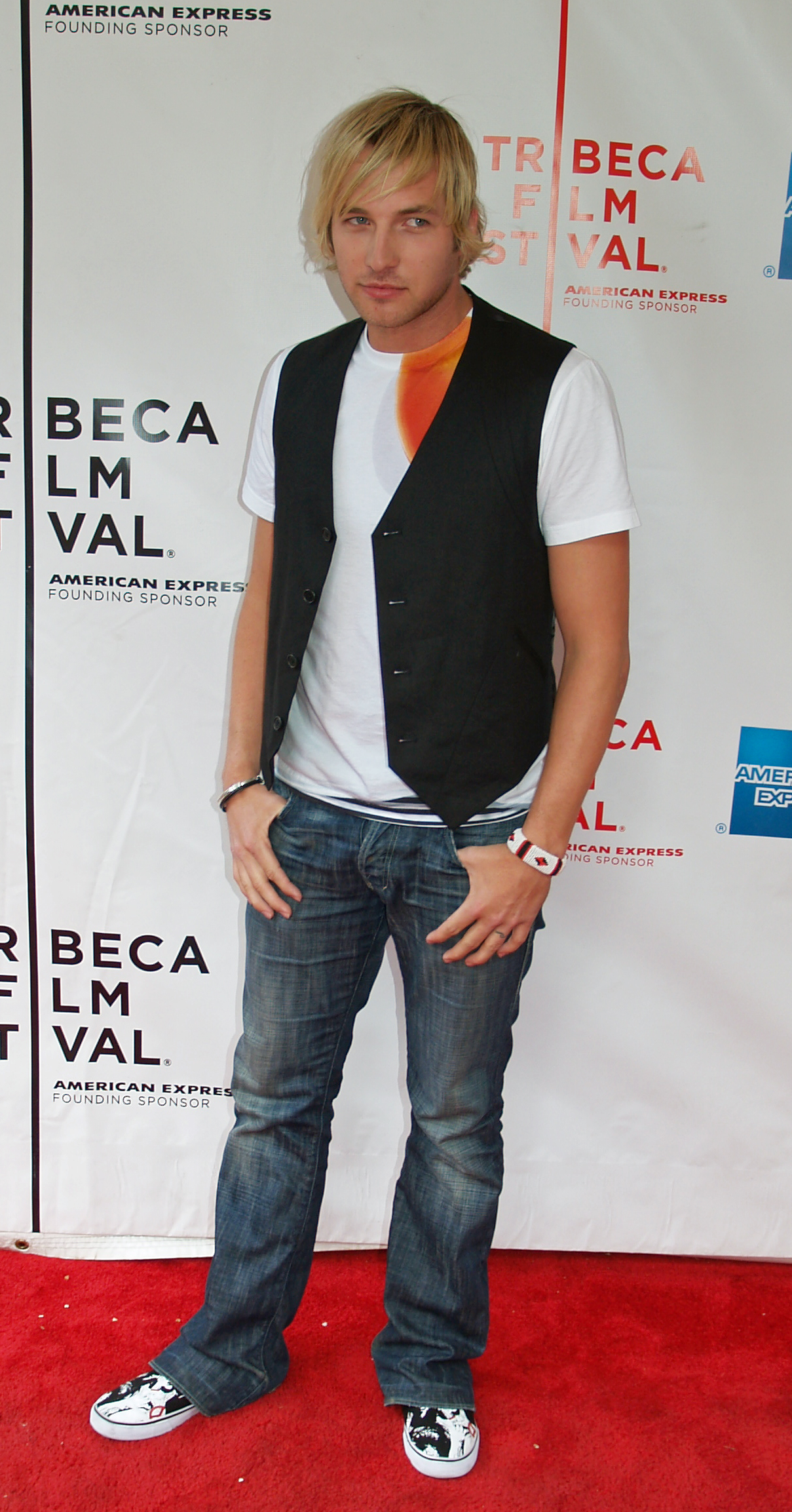 Ryan Hansen